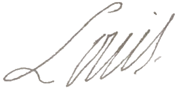 Firma de Luis XVI del 20 de enero de 1793 con fondo transparente